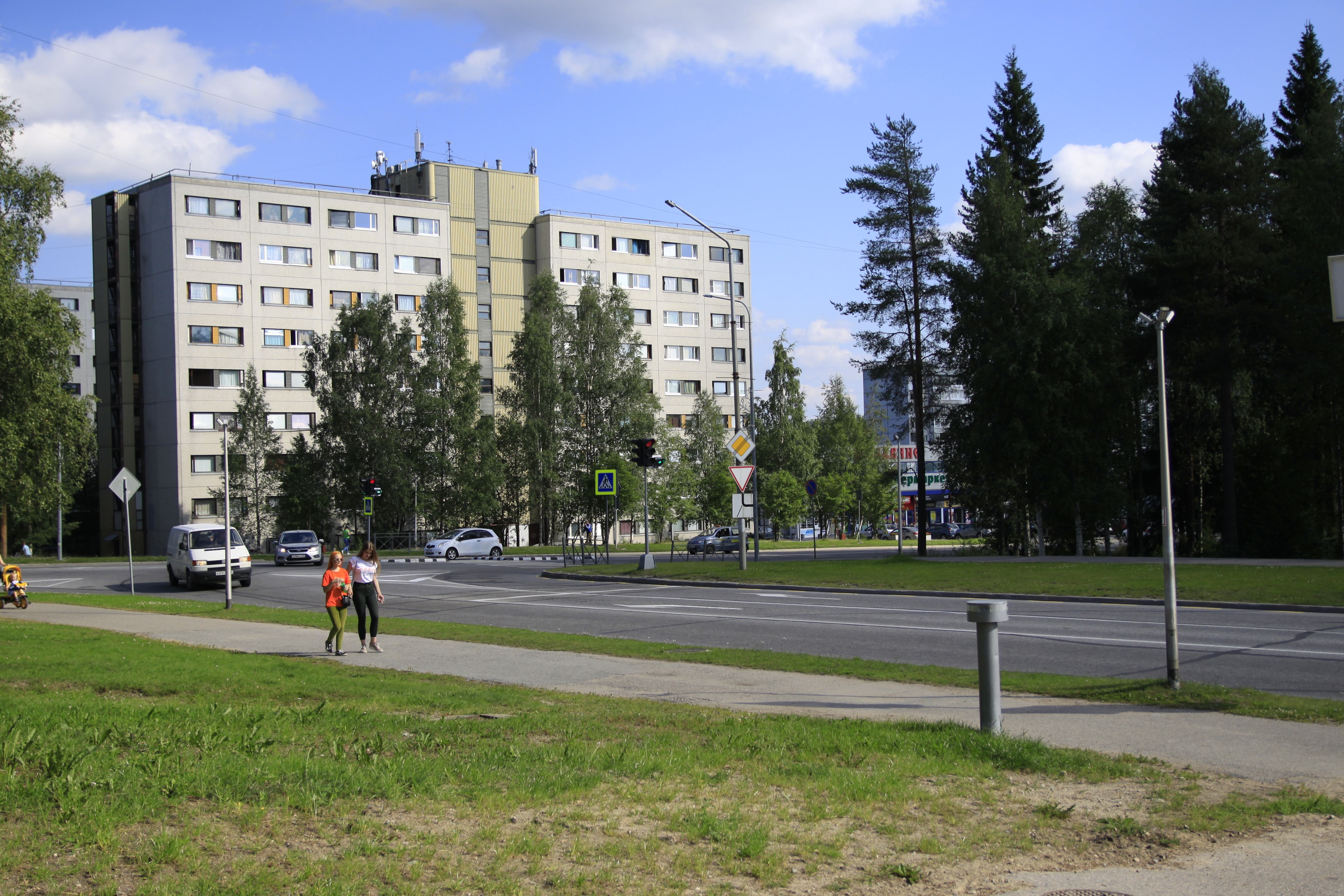 Kostamuksen keskustaa, kuvassa Prospekt Gornjakova 2A. Taloa ollut rakentamassa Finn-Stroi -rakennusyhteenliittymä.